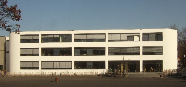 Neubau der Gesamtschule Bonn-Bad Godesberg – Architekt: Karl-Heinz Schommer